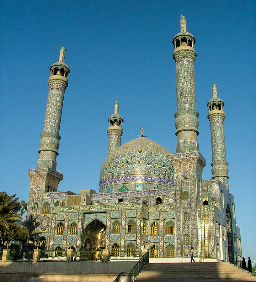 امامزاده سیدمظفر (بندرعباس)